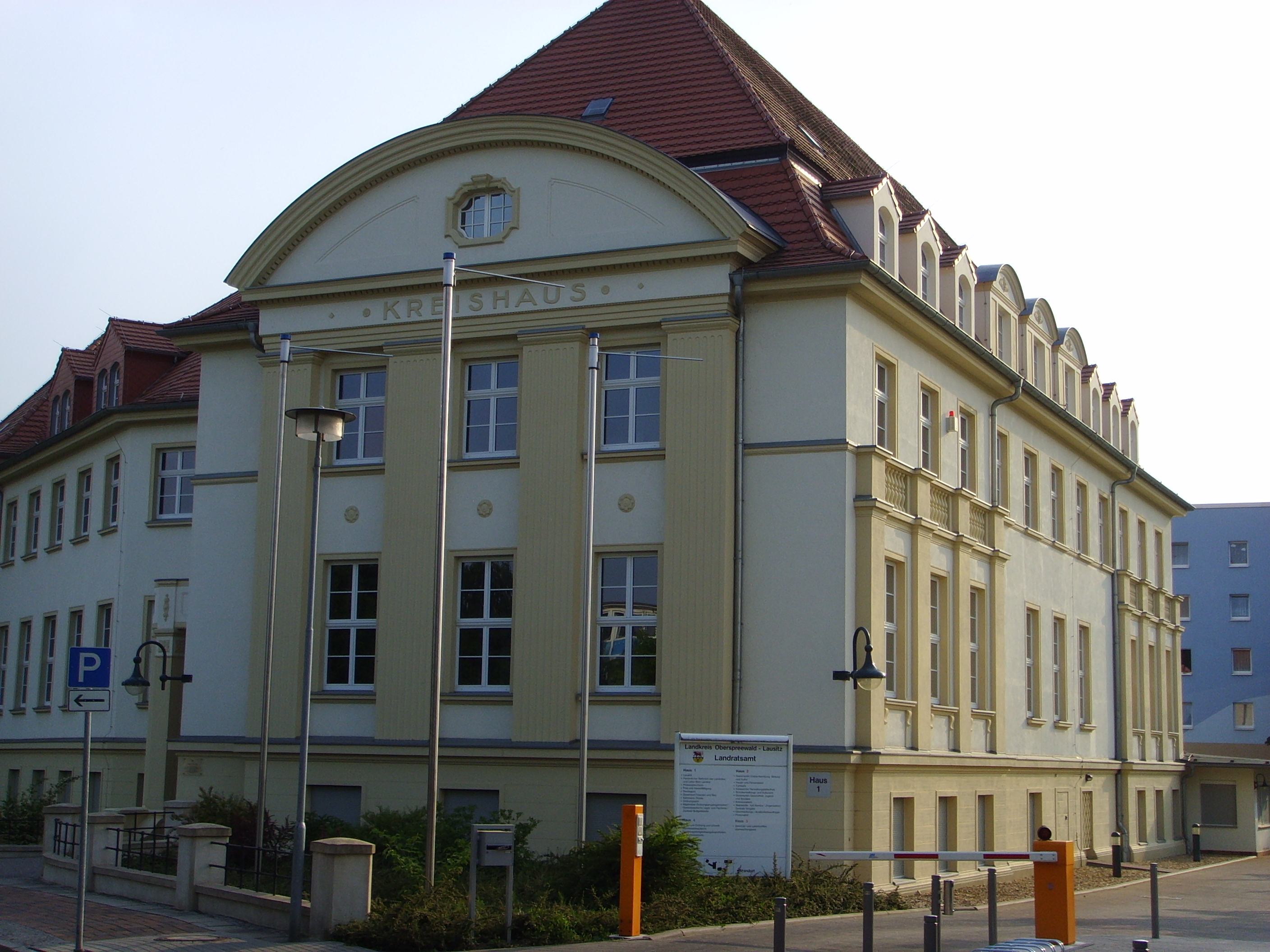 Landratsamt der Oberspreewald-Lausitz-Kreises in Senftenberg